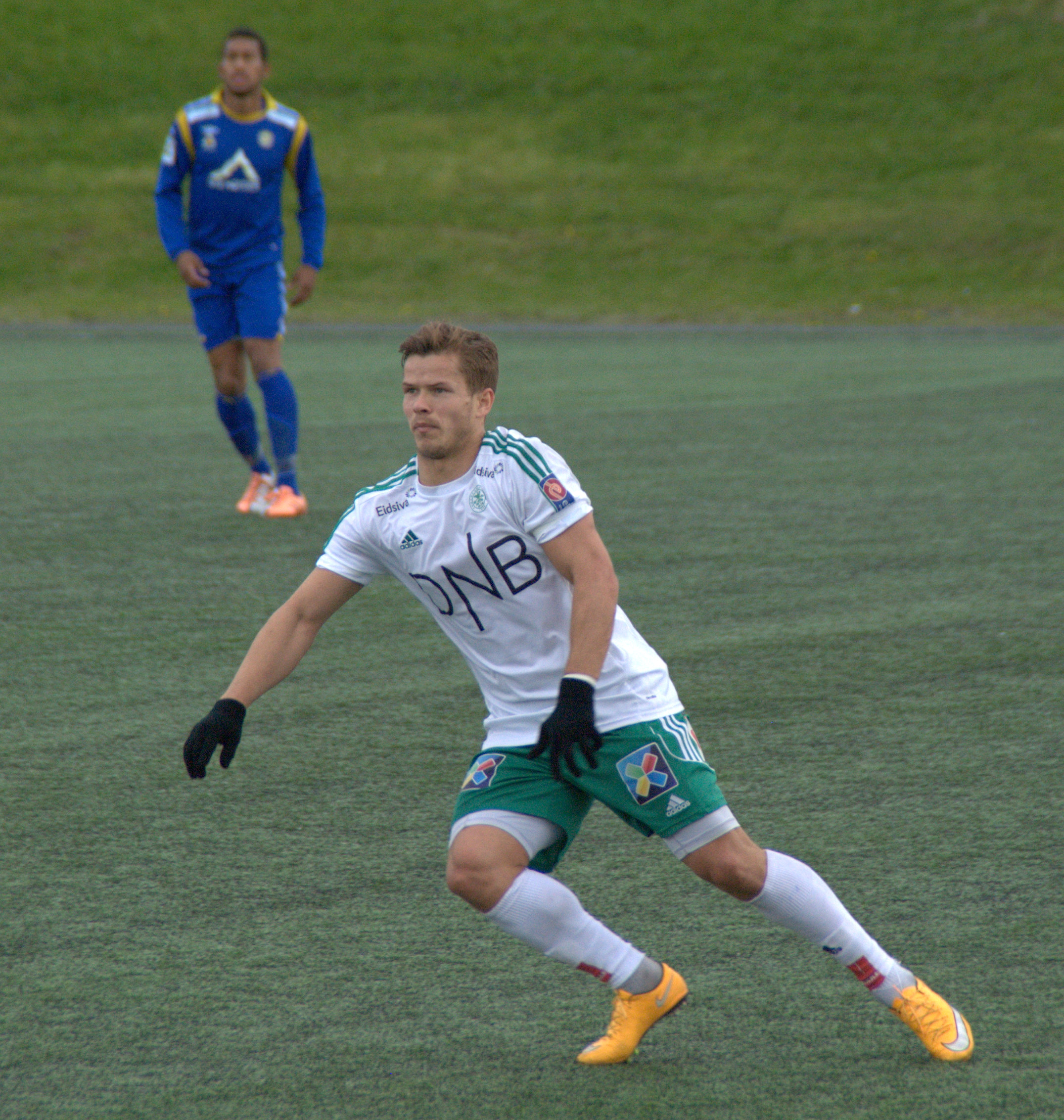 Bajram Ajeti for Hamarkameratene